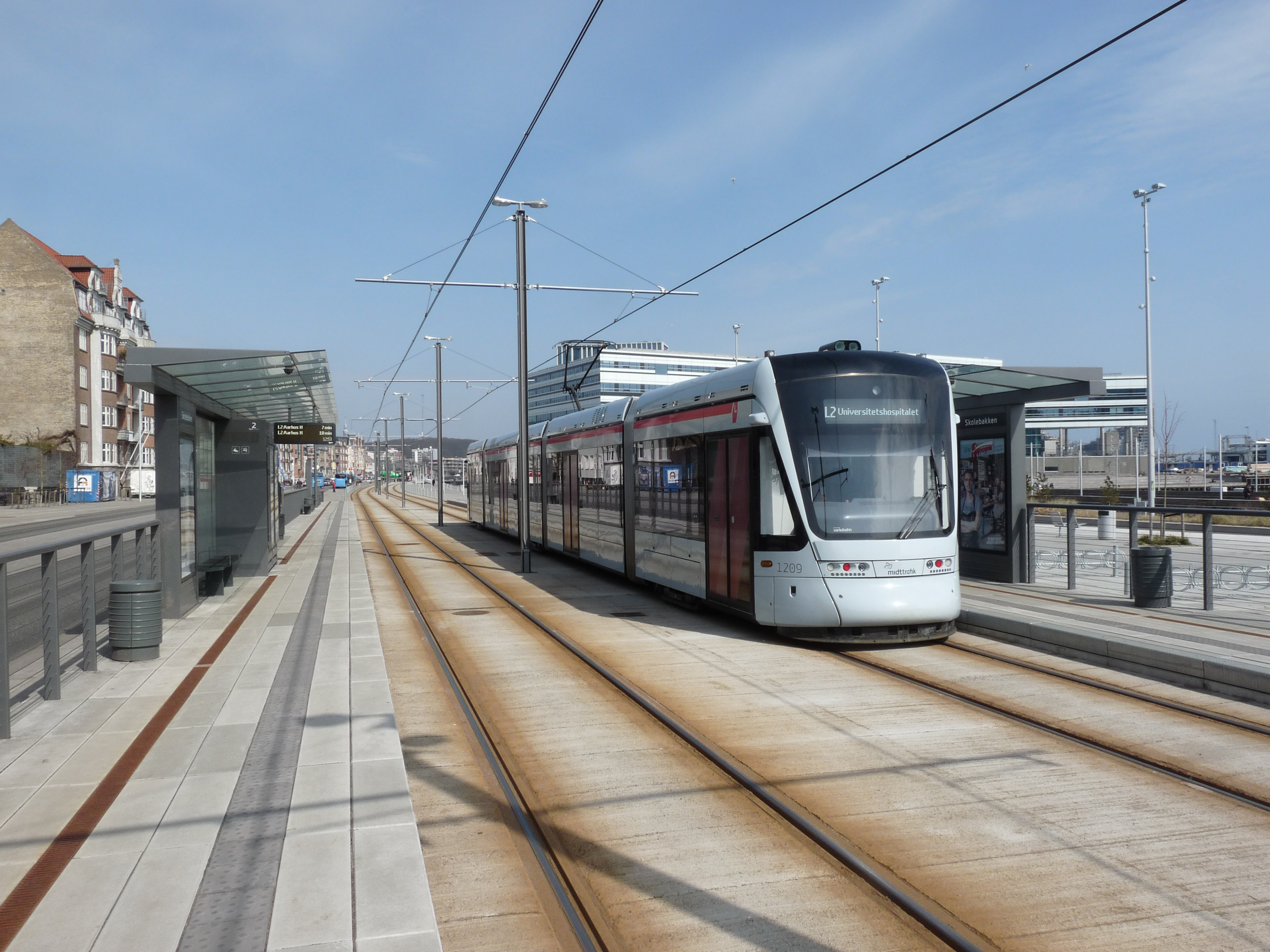 Variobahn Tram in Aarhus, halte Skolebakken